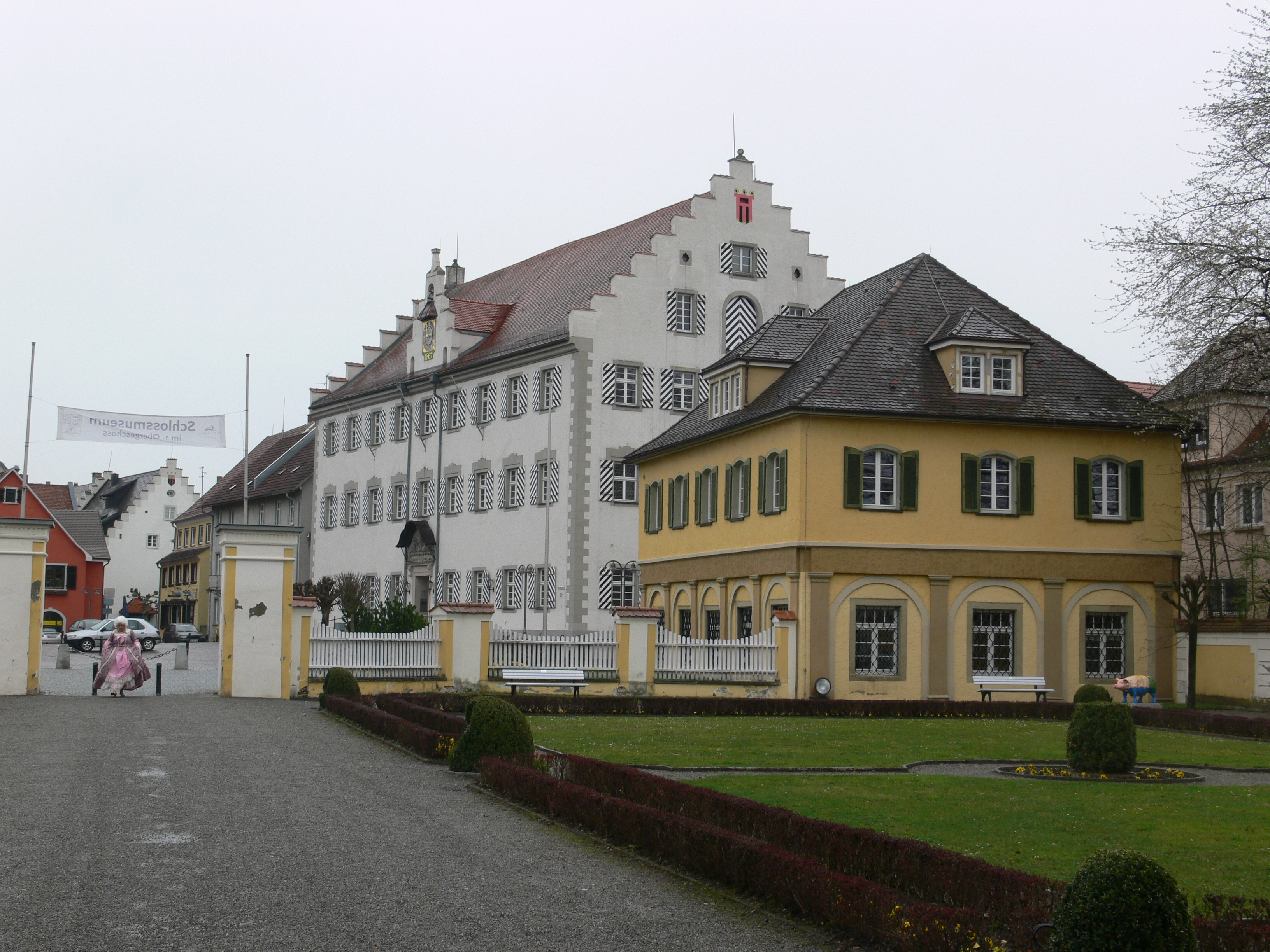 Blick vom Schloss zum Montfortplatz in Tettnang mit (in der Mitte des Bildes) dem Alten Schloss (Rathaus)